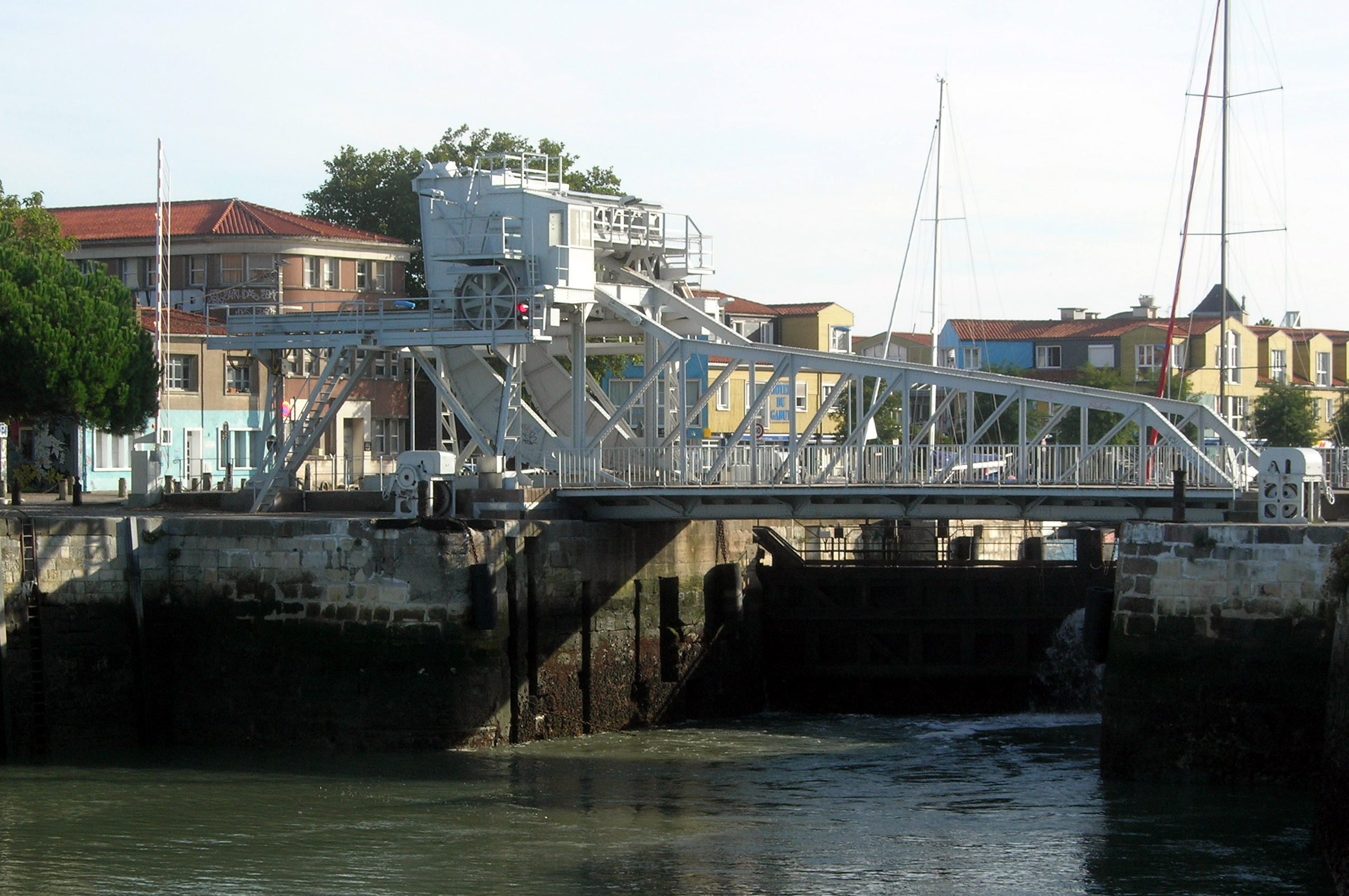 Description =Ecluse et pont au Gabut à La Rochelle Source =Photo taken by Remi Jouan Date =Octobre 2006 Author =Remi Jouan